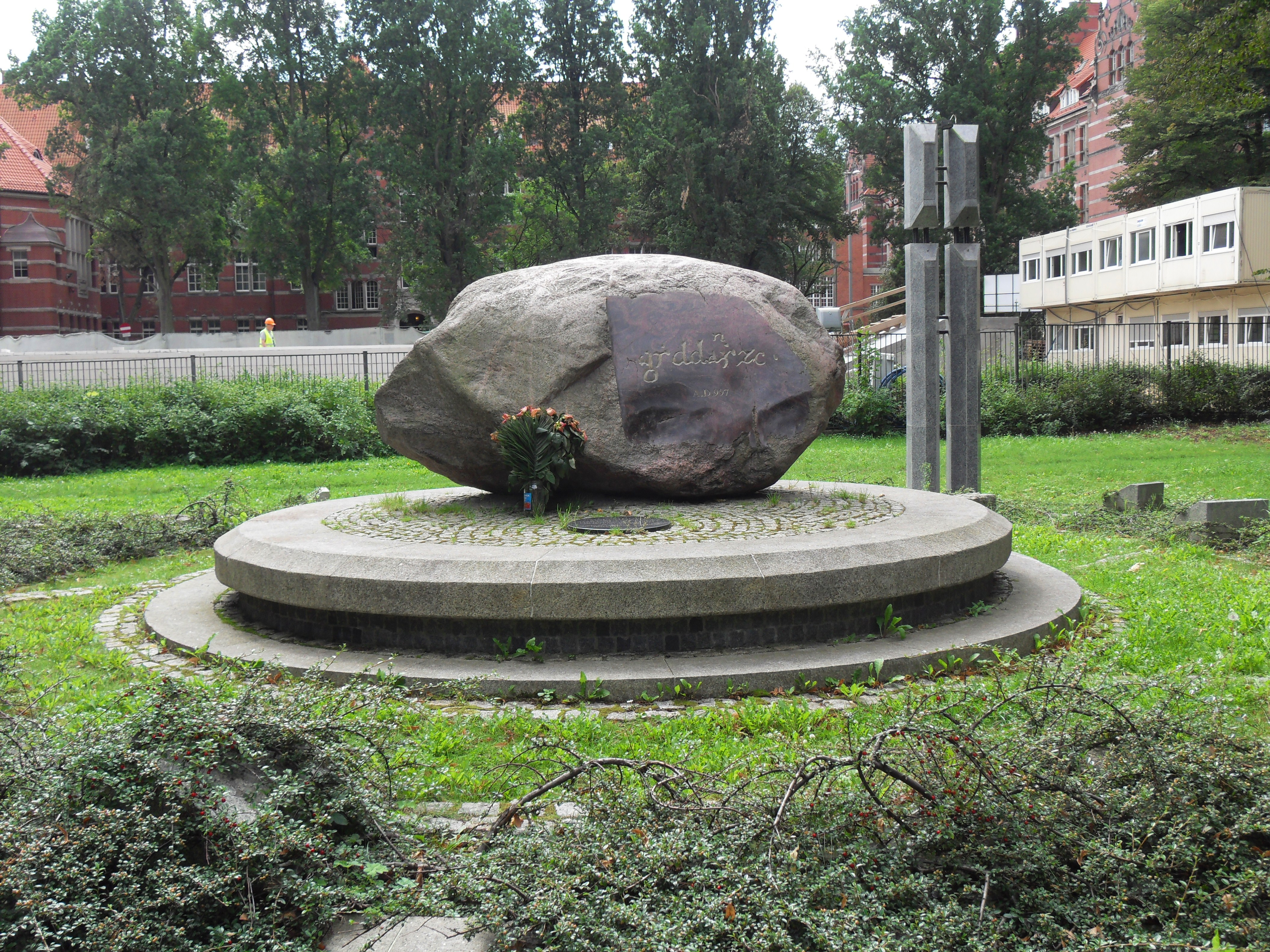 Gdańsk Wrzeszcz Górny. Park Akademicki, pomnik-kamień symbolizujący początek historii Gdańska, ze znaną nazwą miasta "Gyddanyzc".